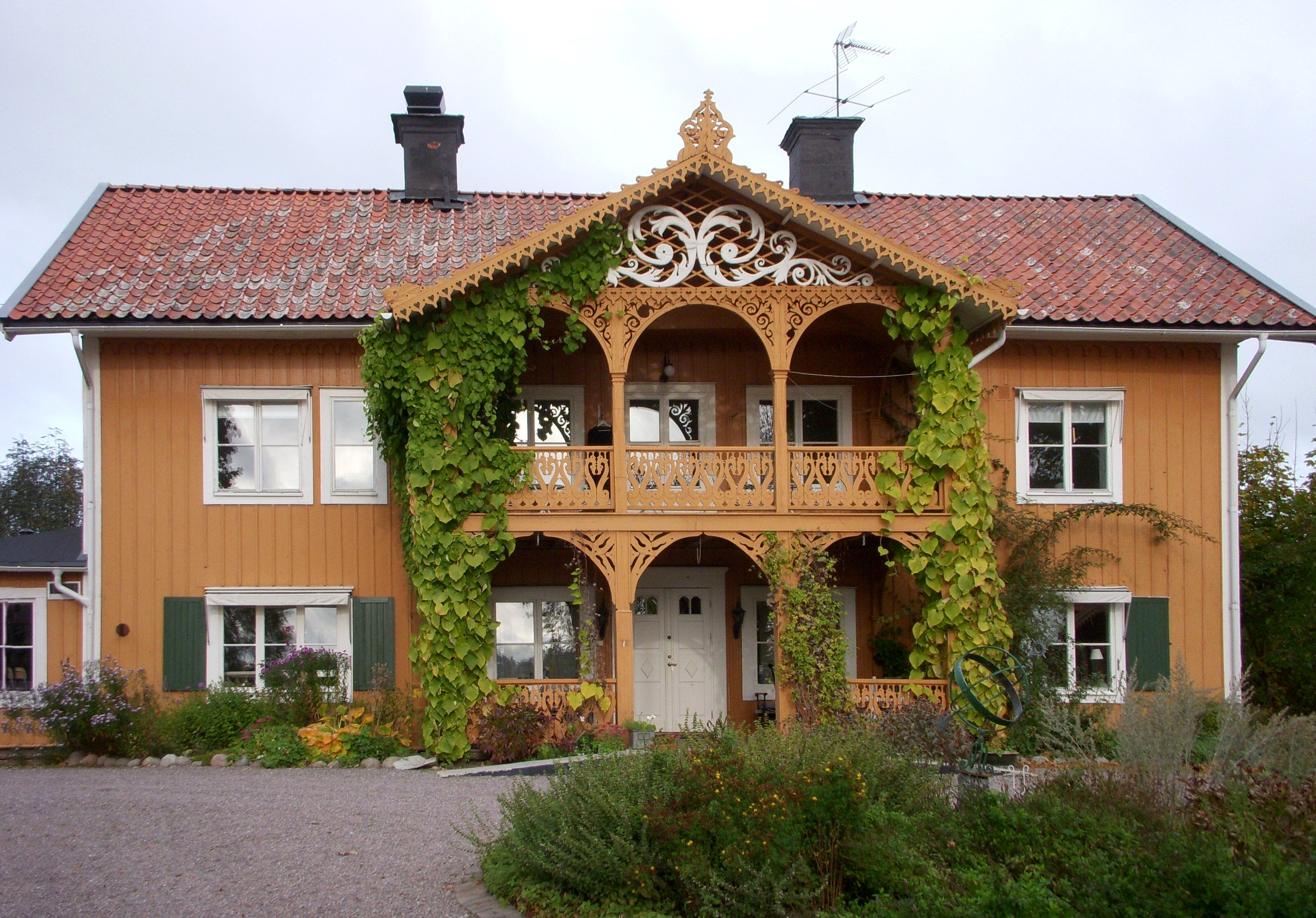 Asknäs herrgård, huvudbyggnad